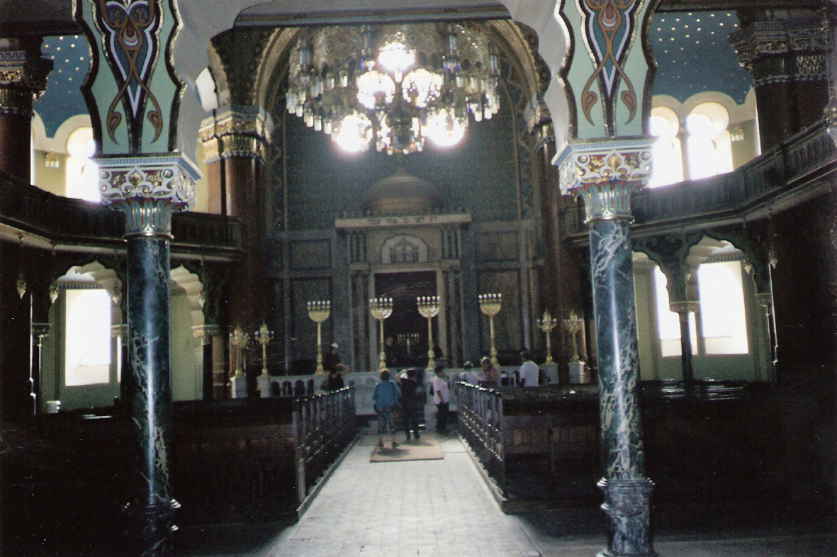 sofia-synagogue